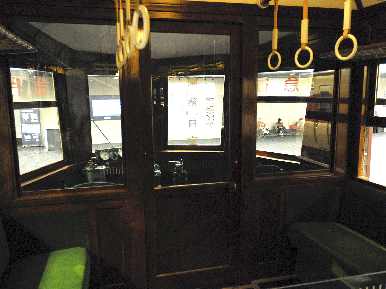 モハ52004 車内より運転台方向（2013年 リニア・鉄道館）